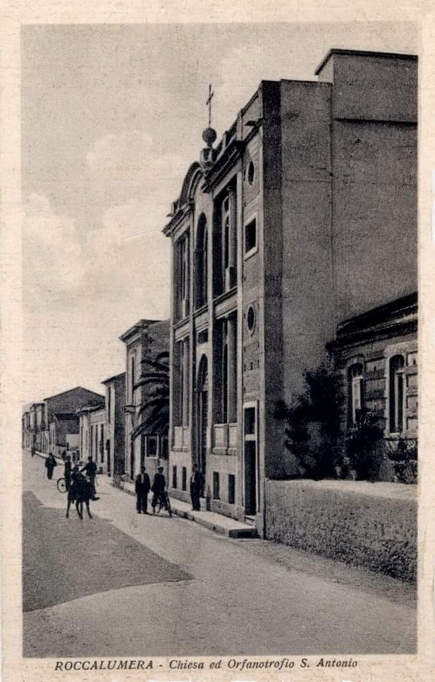 cartolina del Santuario 1930circa